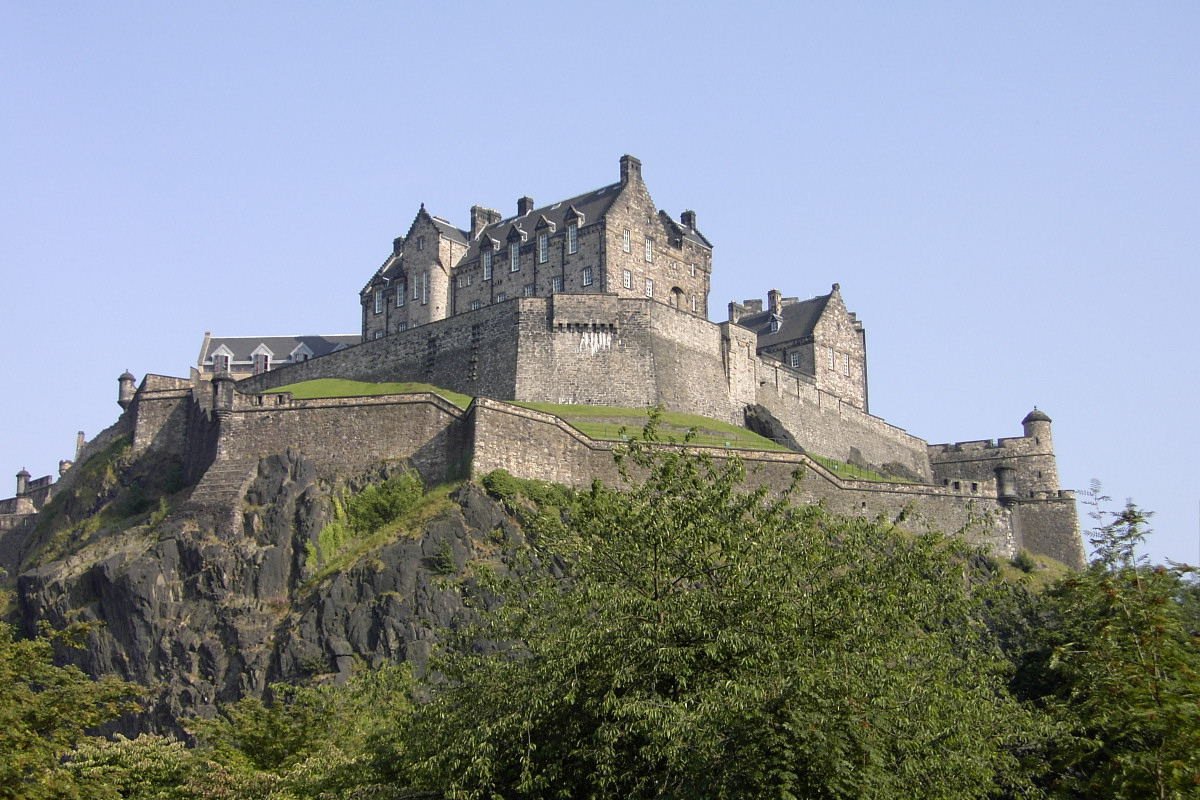 Im Hintergrund auf dem Berg erkennt man Edingurgh Castle, das ich am 1.August 2004 photographiert habe.